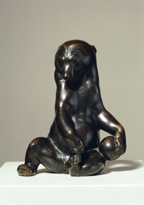 Spielender Bär, Bronze, 26 cm